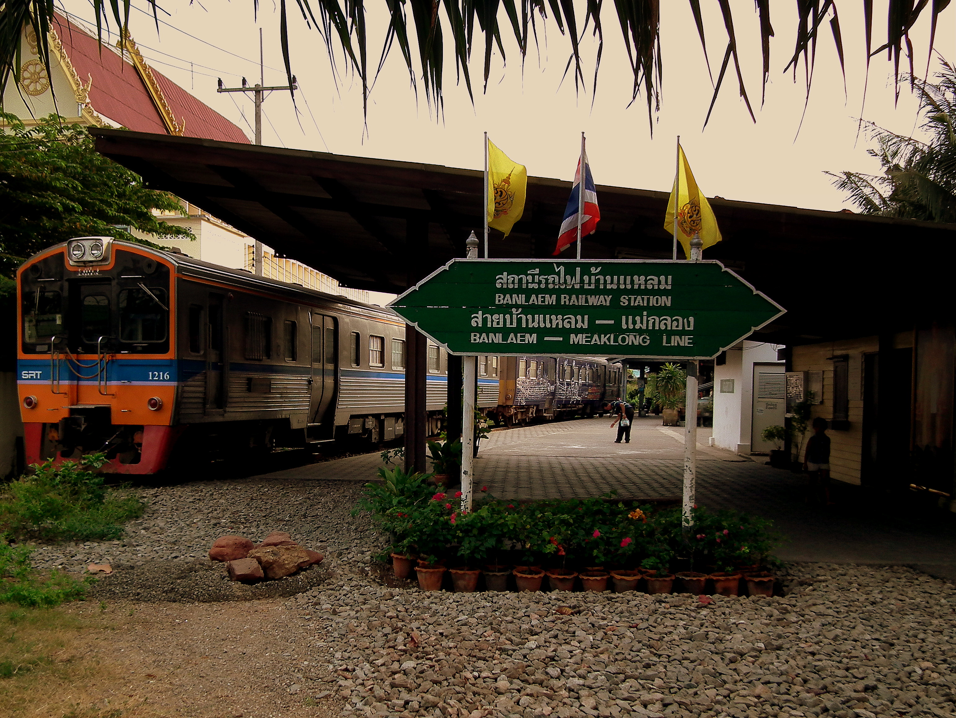 BANLAEM STATION MAEKLONG LINE THAILAND JAN 2012